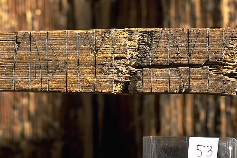 Träkors från Ikigaat/Herjolfsnes, Grönland. Inskriften lyder: Gud den allsmäkte vakta Gudleif väl. Motiv: Kat nr 053 Kors av trä, från Danmark Nyckelord: Runor Kategori: Runristning/runsten Träkors från Ikigaat/Herjolfsnes, Grönland. Inskriften lyder: Gud den allsmäkte vakta Gudleif väl.